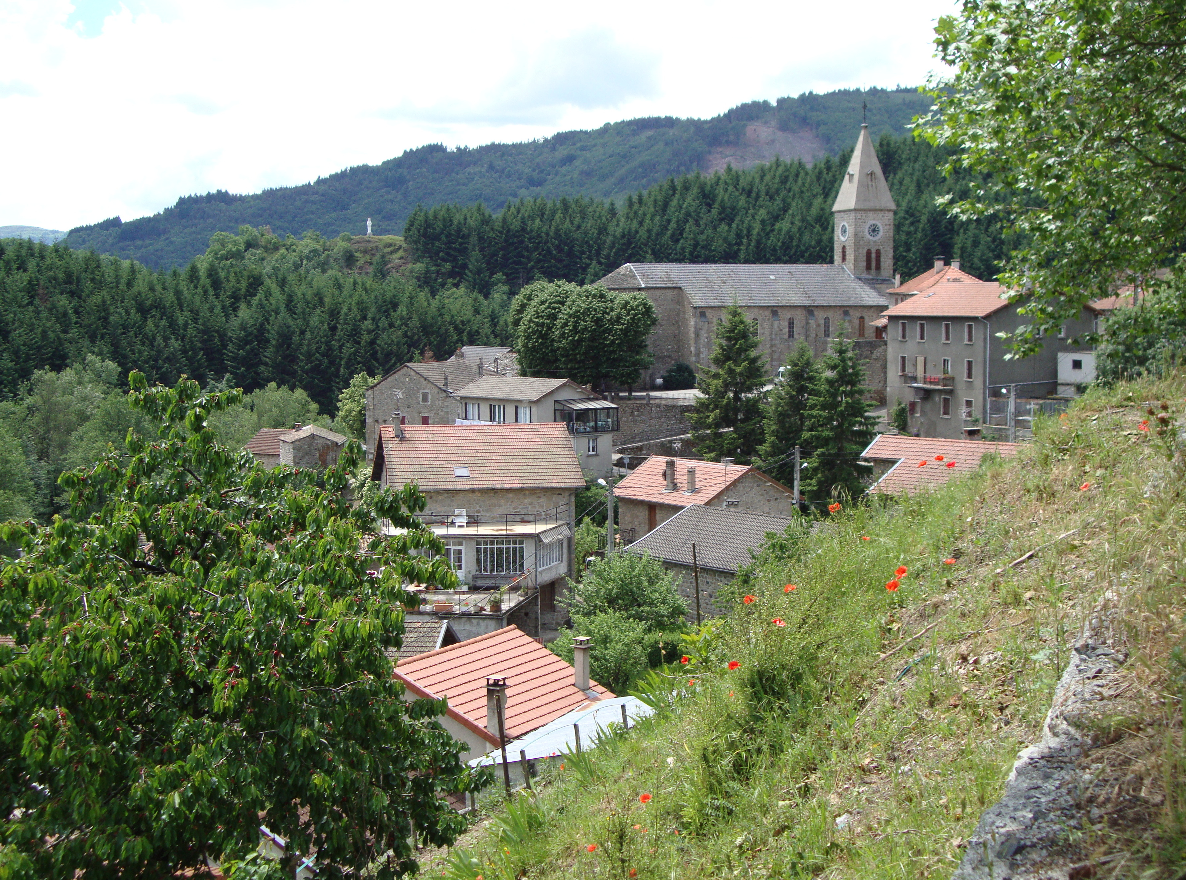 St.Julien-Boutières (Ardèche, Fr) vue du village